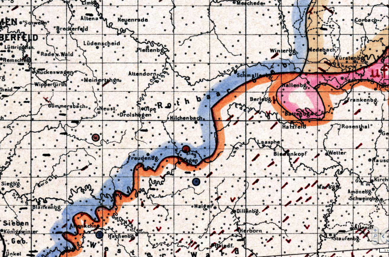 Isoglosse „auf“-„op“ im Siegerland. Siehe auch: Rheinischer Fächer, Kontinentalwestgermanisches Dialektkontinuum